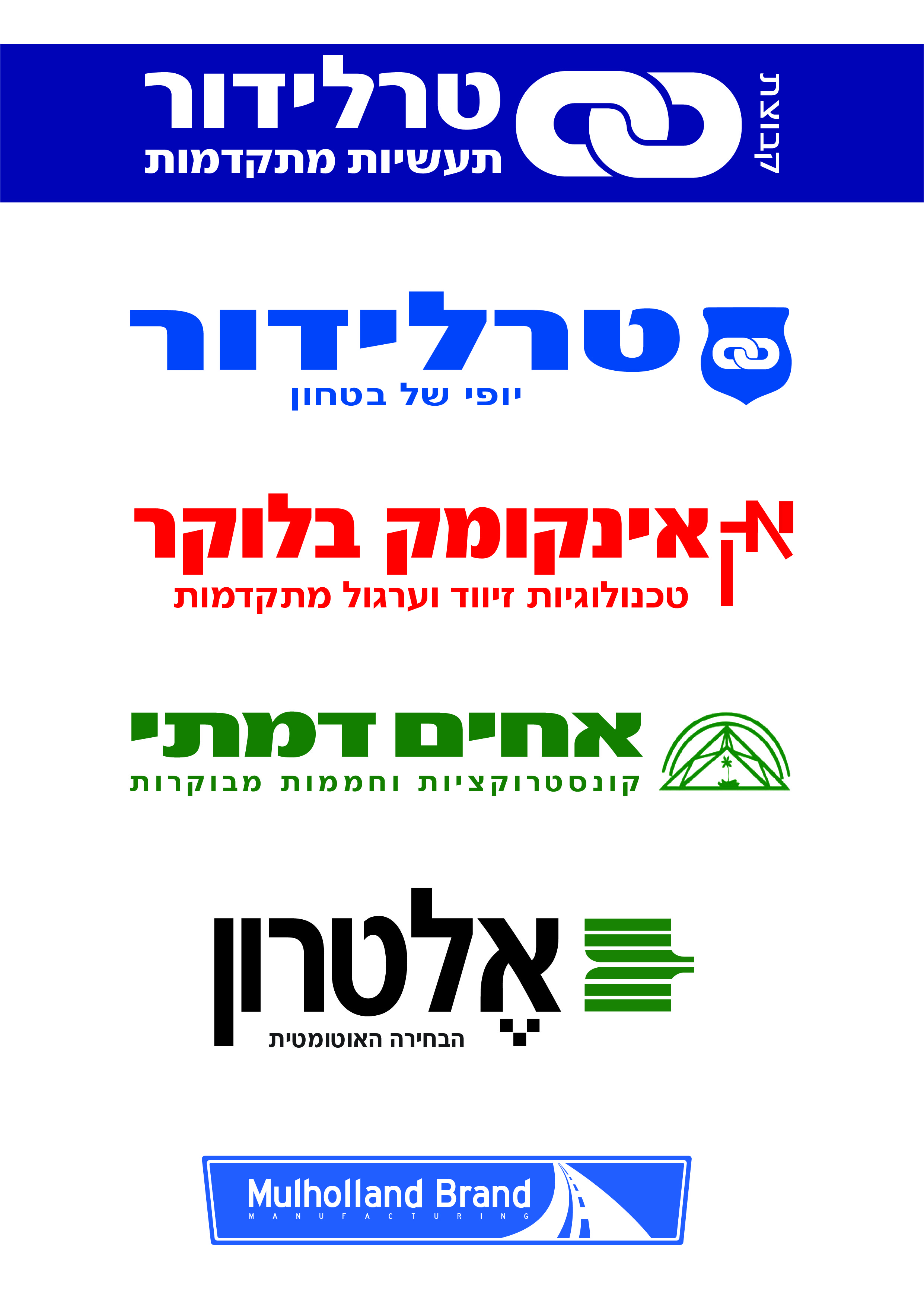 חברות קבוצת טרלידור